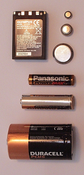 Baterije